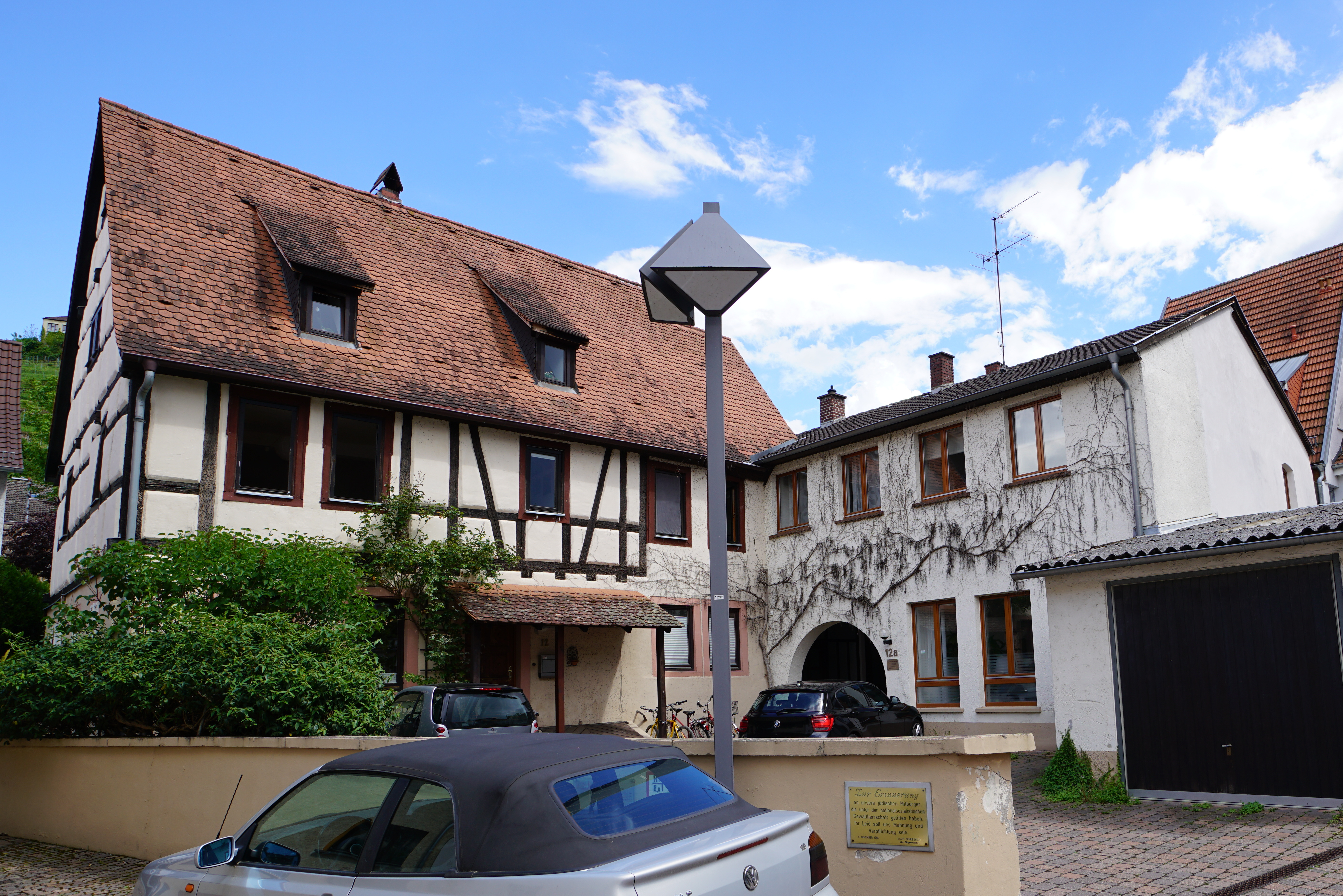 Rechts das Gebäude der ehemaligen lutherischen Kirche / Synagoge - umgebaut zu einem Wohnhaus. Links das ehemalige Pfarrhaus / jüdische Gemeindehaus